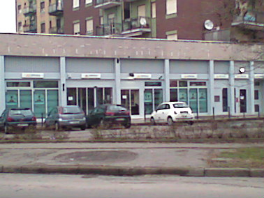 La ex Cascina Triante attualmente trasformata in una Banca.